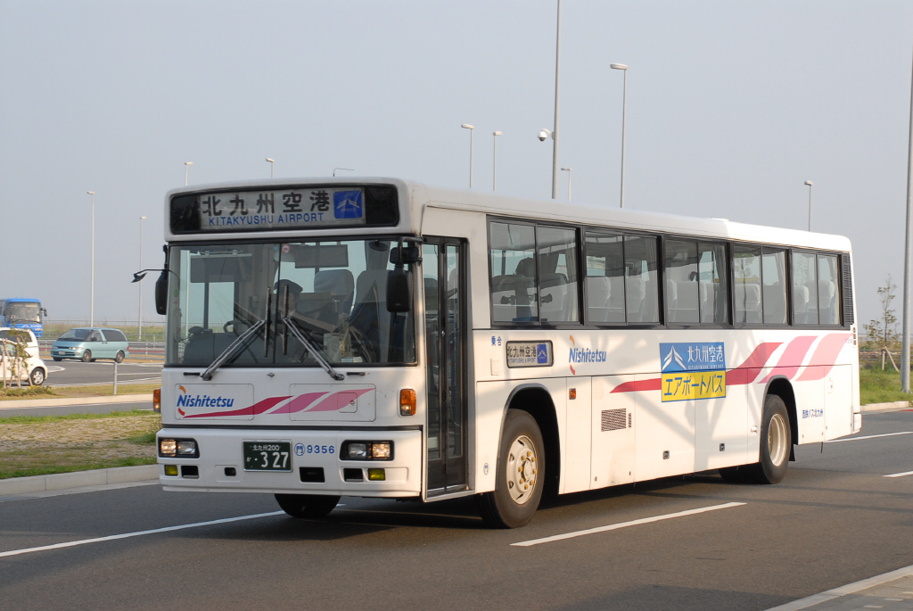 北九州空港にて、2008-5-1撮影